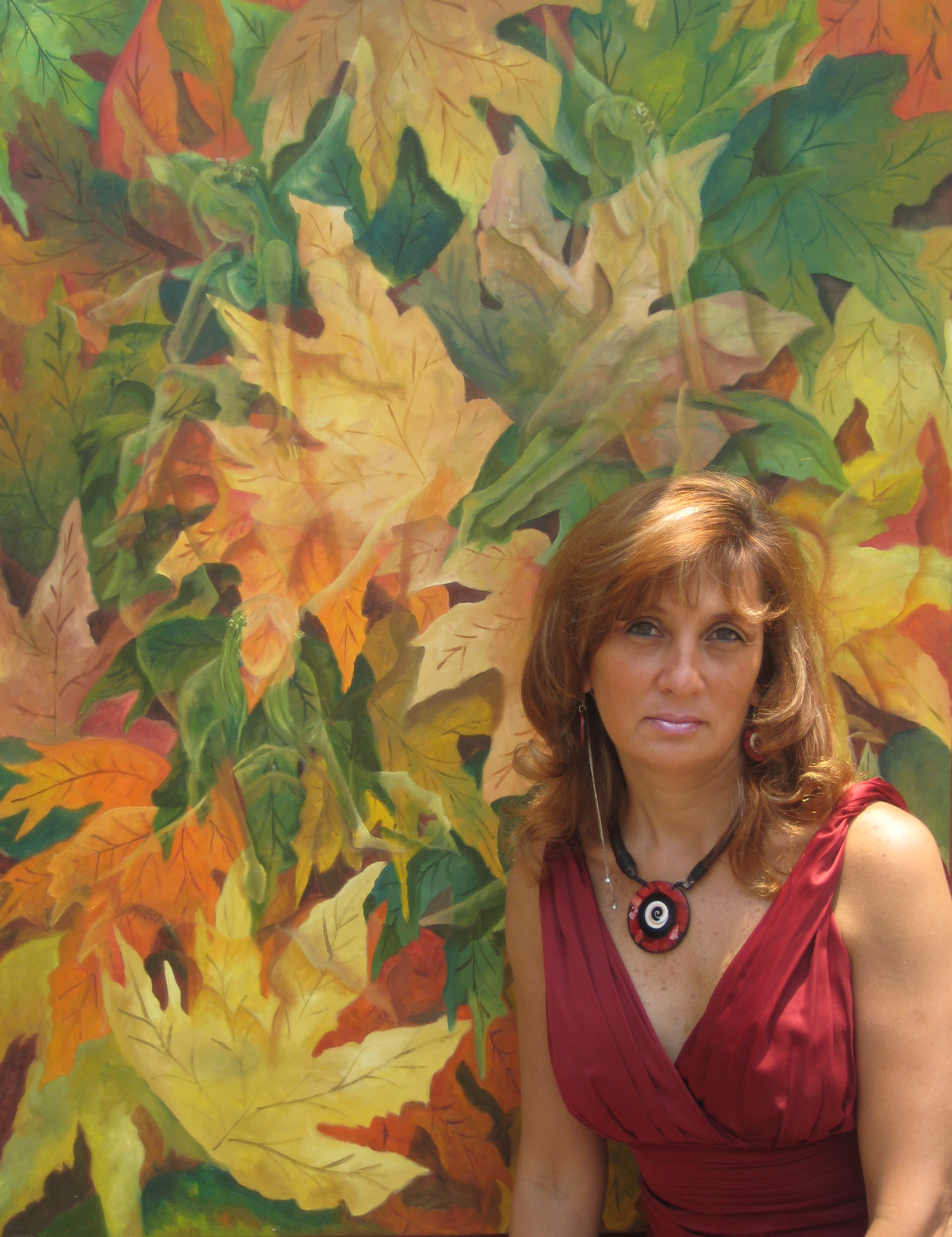 Foto de Angélica Argüelles con su obra